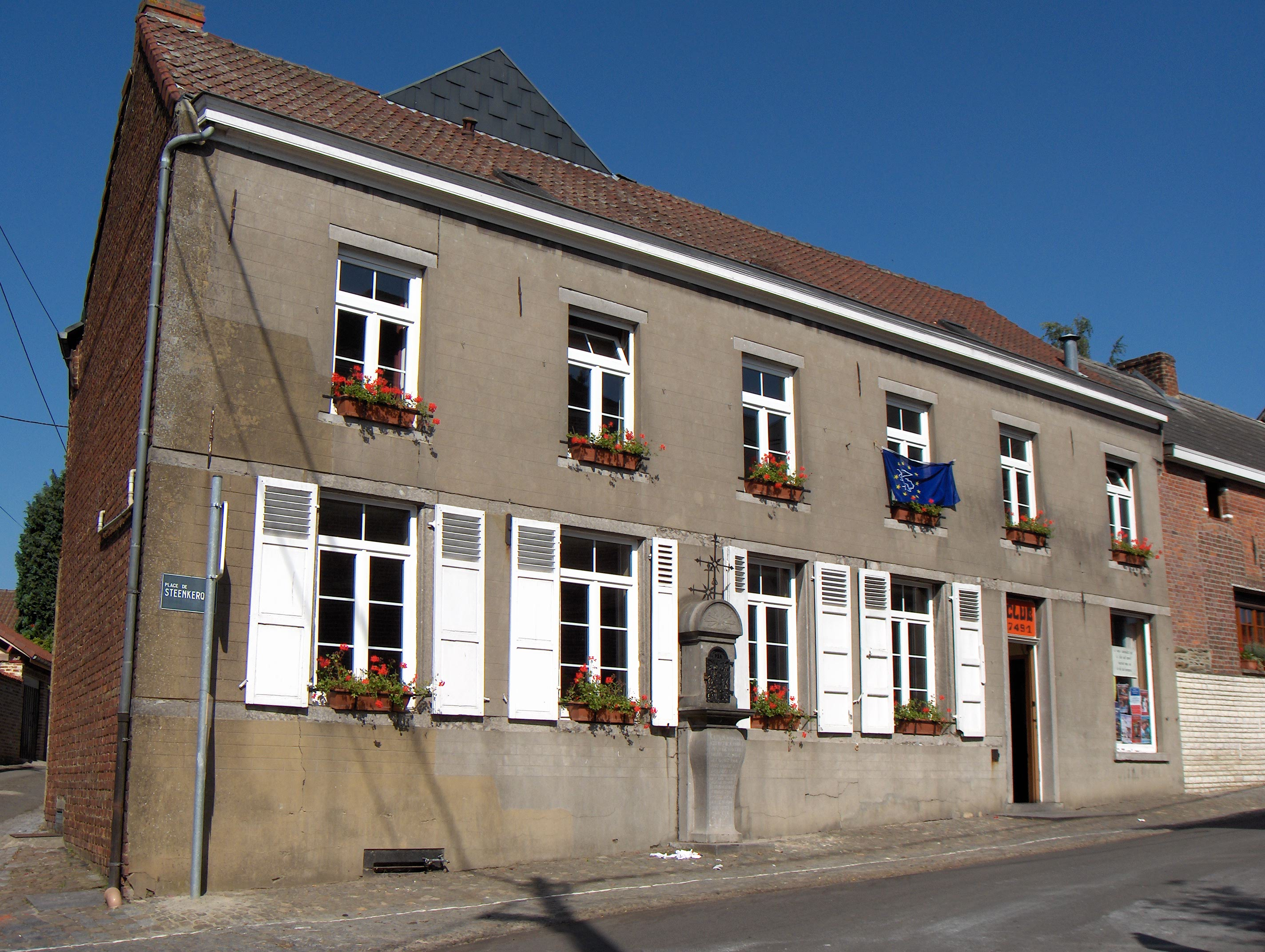 Steenkerque, Ortsteil der Gemeinde Braine-le-Comte, Prov. Hennegau (Belgien), Clubhaus des Vereins "Club 7491" im ehemaligen Dorffesthaus an der Place de Steenkerque.